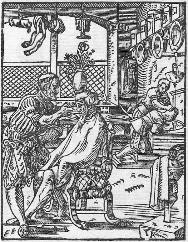 Original image description from the Deutsche Fotothek Ständebuch & Militär & Handwerk & Scherer & Feldscherer & Barbier